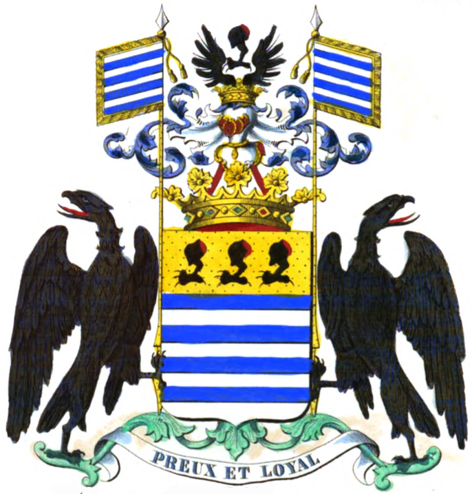 Armoiries de la famille van der Straten Waillet